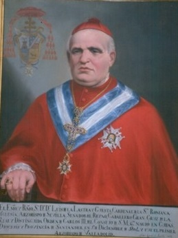 Retrato del cardenal Luis de la Lastra y Cuesta (1803-1876), que fue arzobispo de Sevilla y de Valladolid. Es una copia realizada por Andrés Cortés de otro idéntico que se conserva en el Palacio arzobispal de Sevilla.